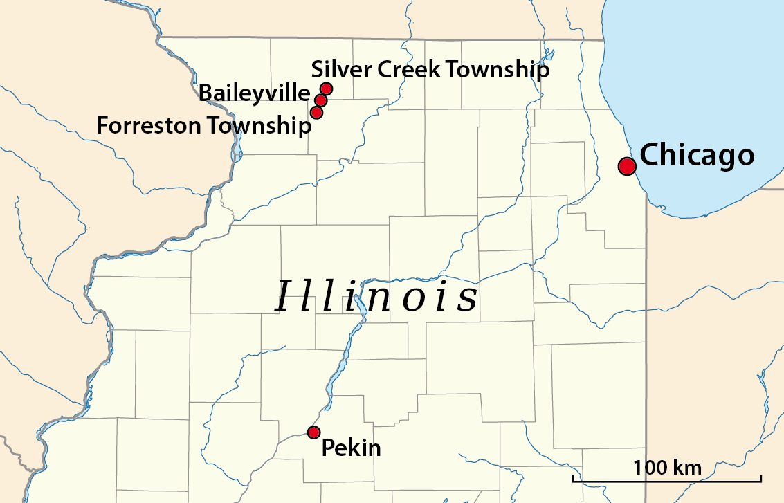 Karte der ersten baptistischen Auswanderergemeinden in Illinois